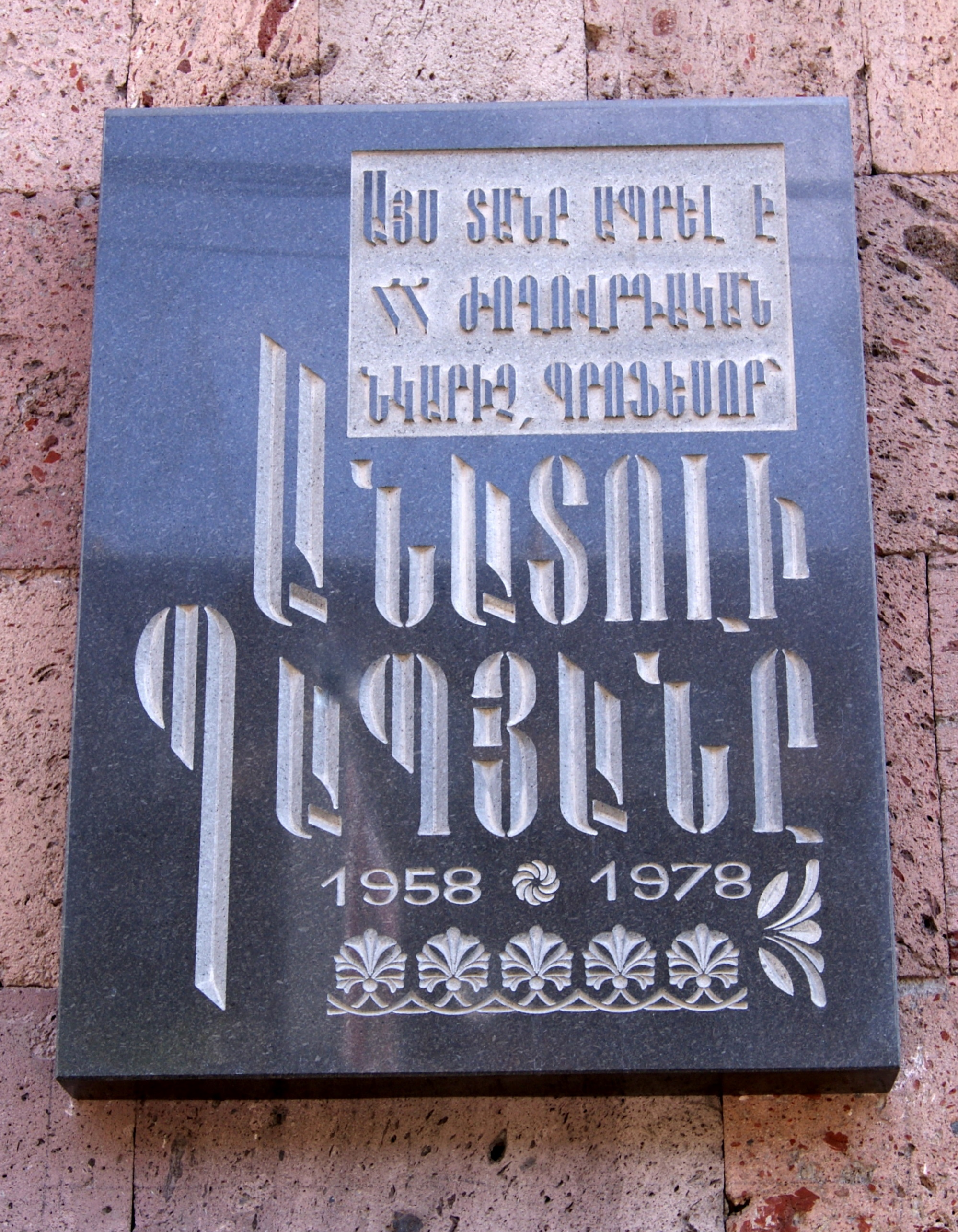 Anatoly Papyan's Plaque